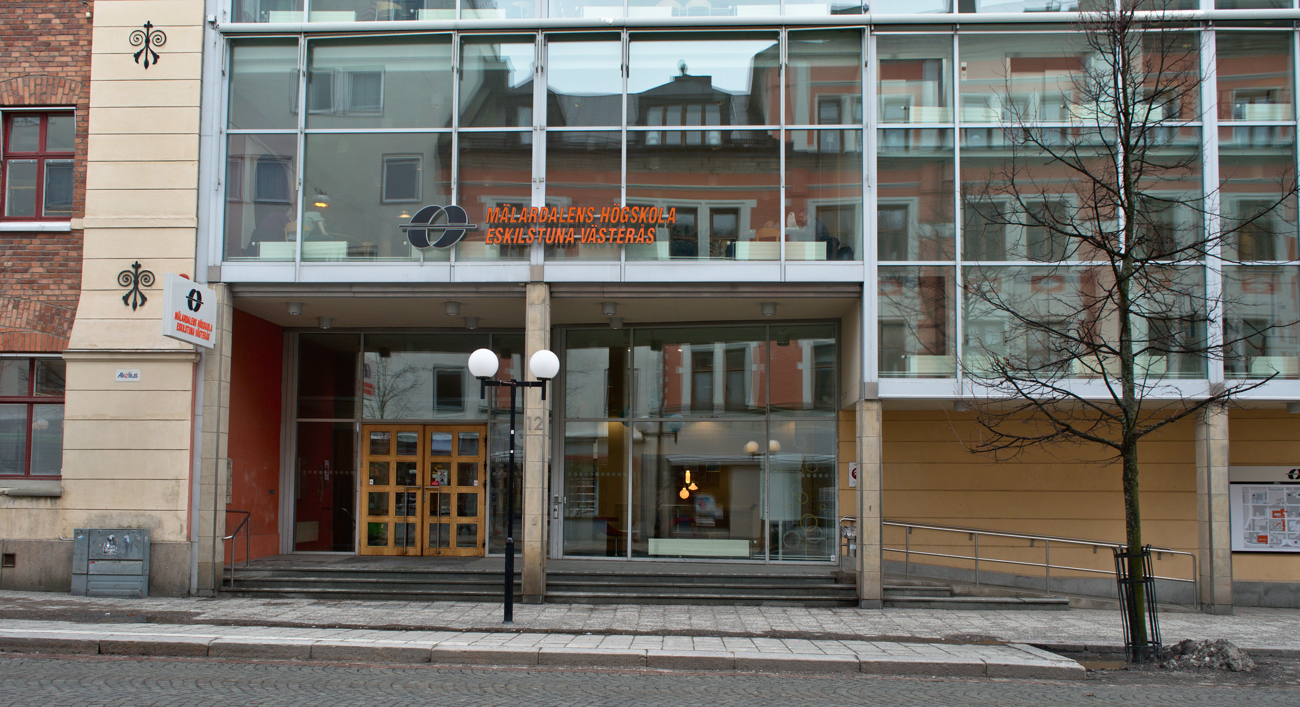 Mälardalens Högskola på Drottninggatan i Eskilstuna